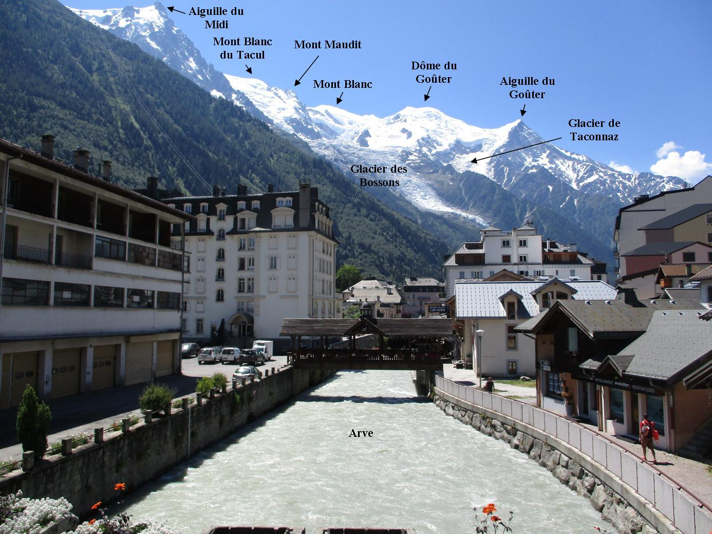 008.jpg + noms